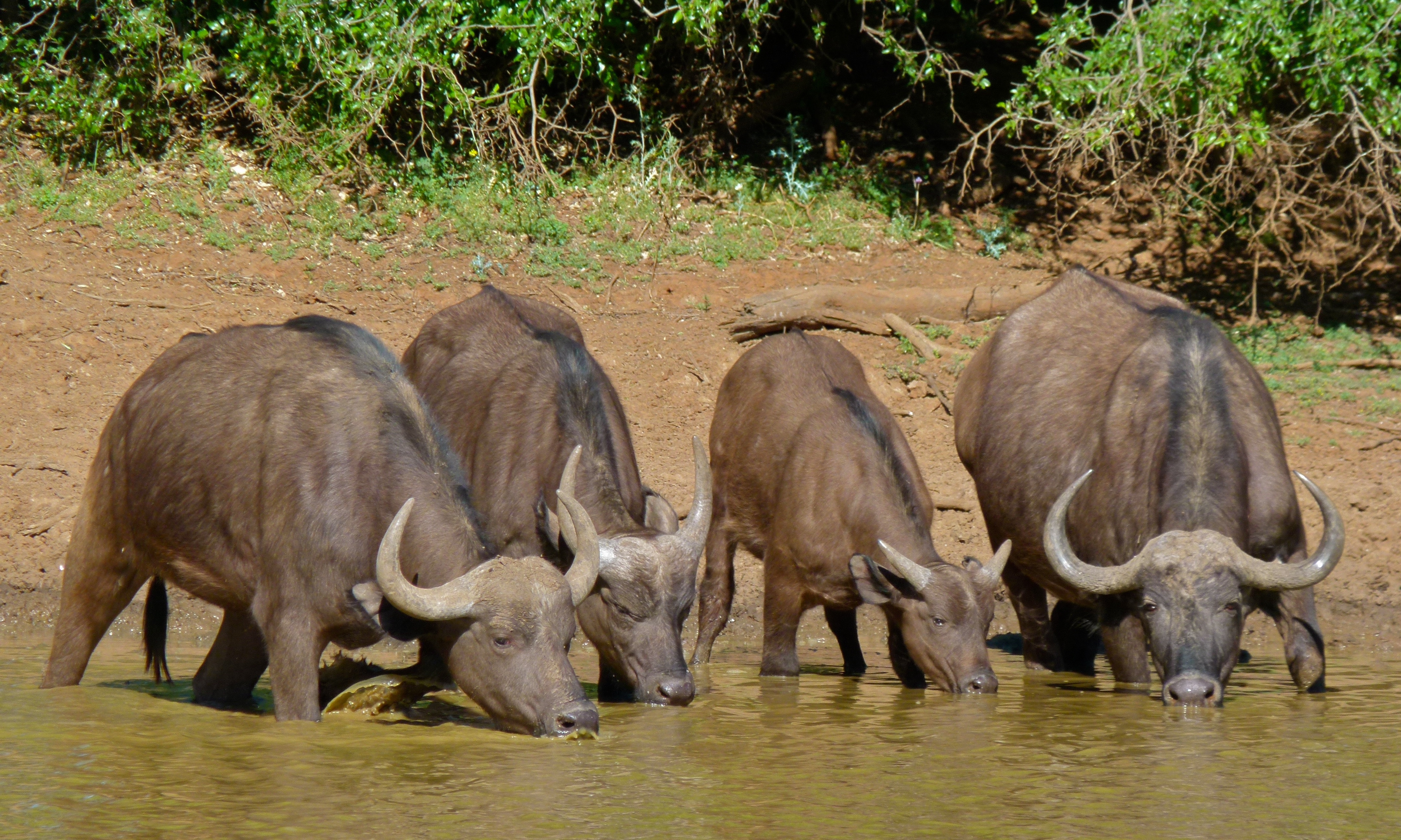 Stofdam Bird Hide, Mokala NP, SOUTH AFRICA